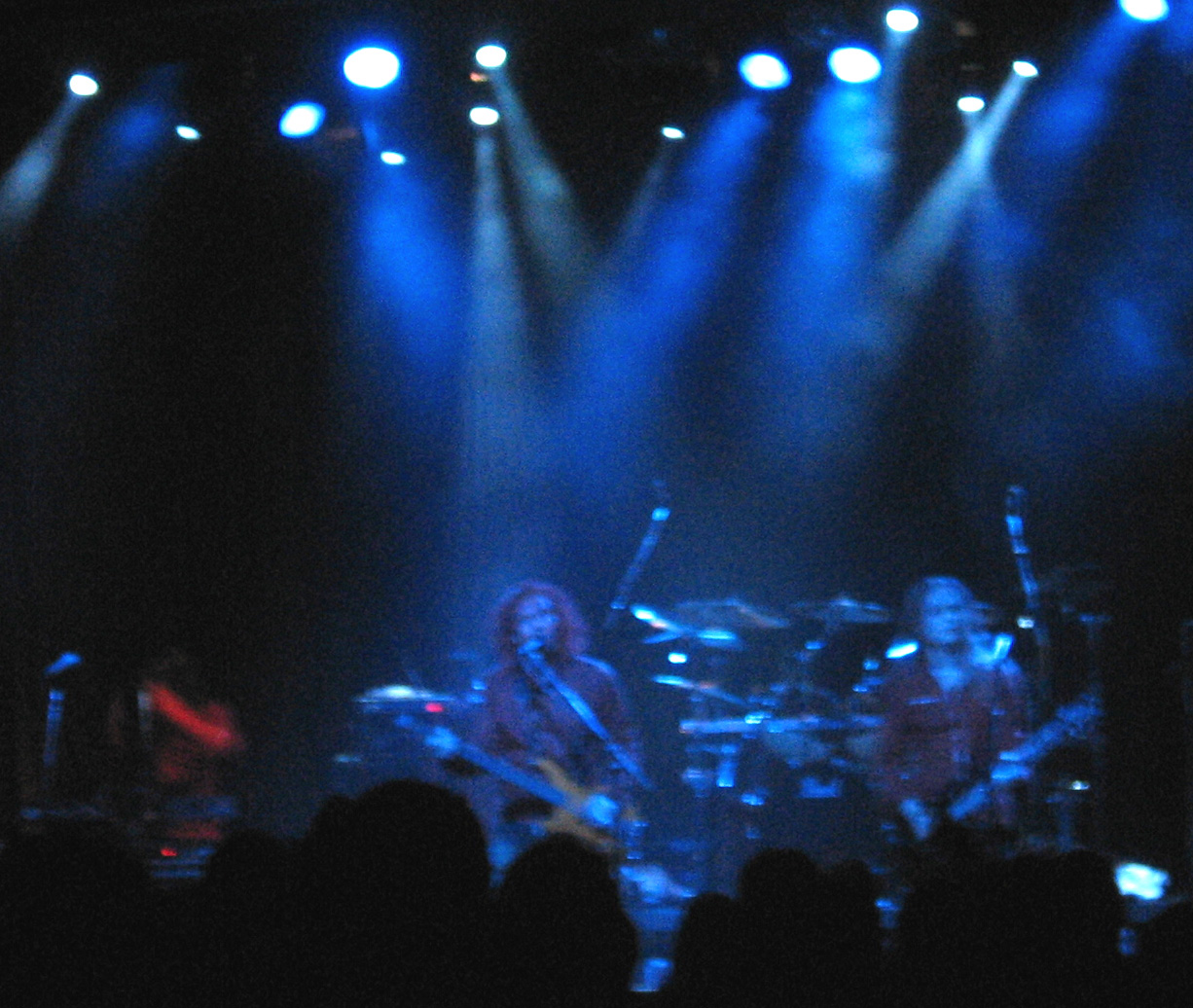 Waltari Tavastialla 18.1.2006